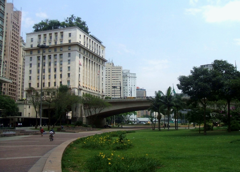 Edifício Matarazzo, sede da Prefeitura de São Paulo, visto do Vale do Anhangabaú. São Paulo, Brasil